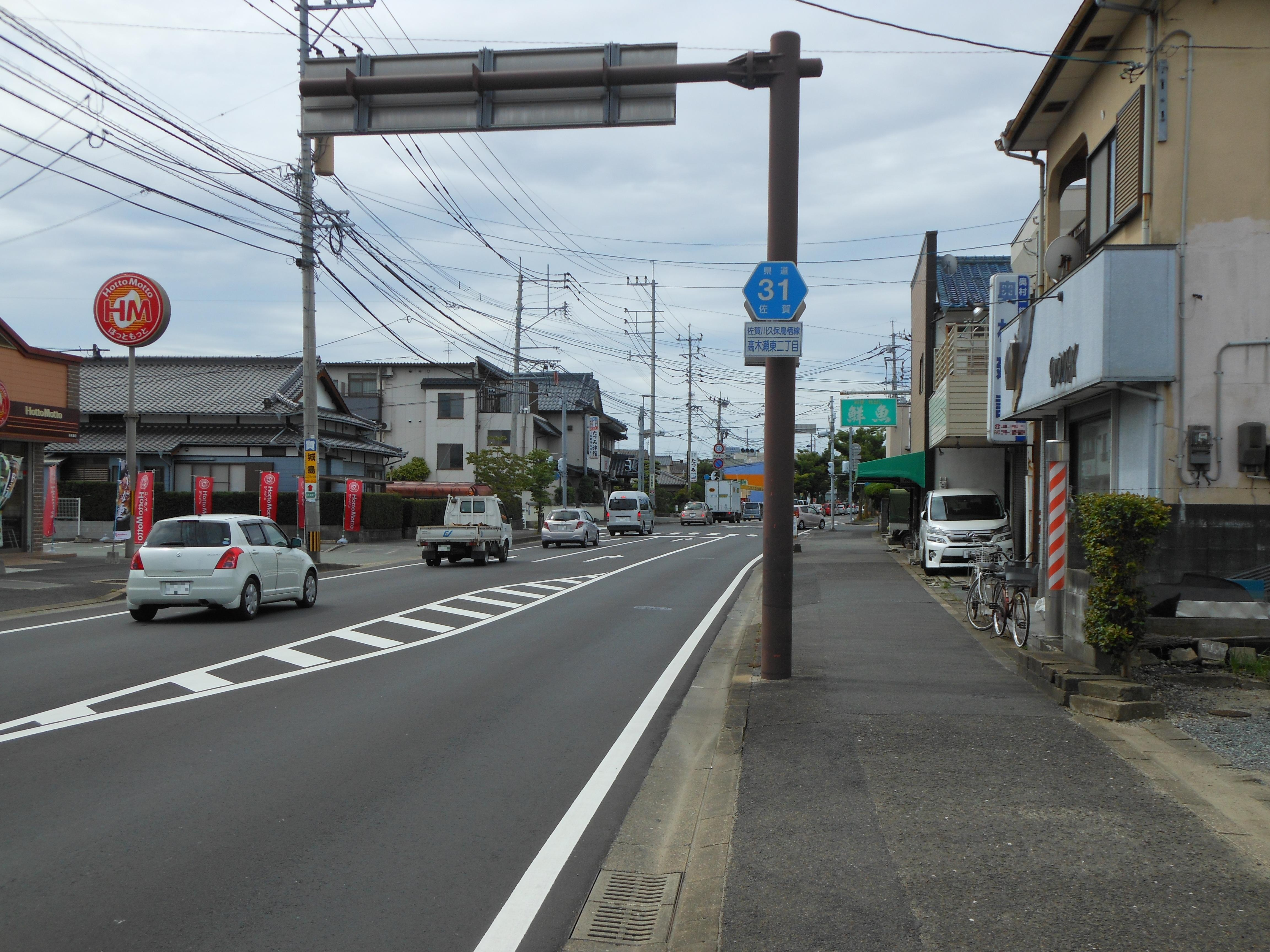 佐賀県道31号佐賀川久保鳥栖線、佐賀県佐賀市高木瀬東二丁目付近。